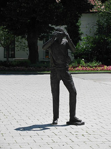 Turisti skulptuur Badeni termide (Römertherme) ees Austrias. Skulptuuri autor teadmata.